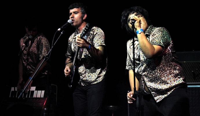 Los Peyotes en 2015.